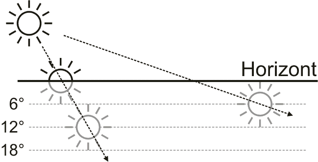 Bild: Verlauf der Dämmerung in Abhängigkeit von verschiedenen Breitengraden